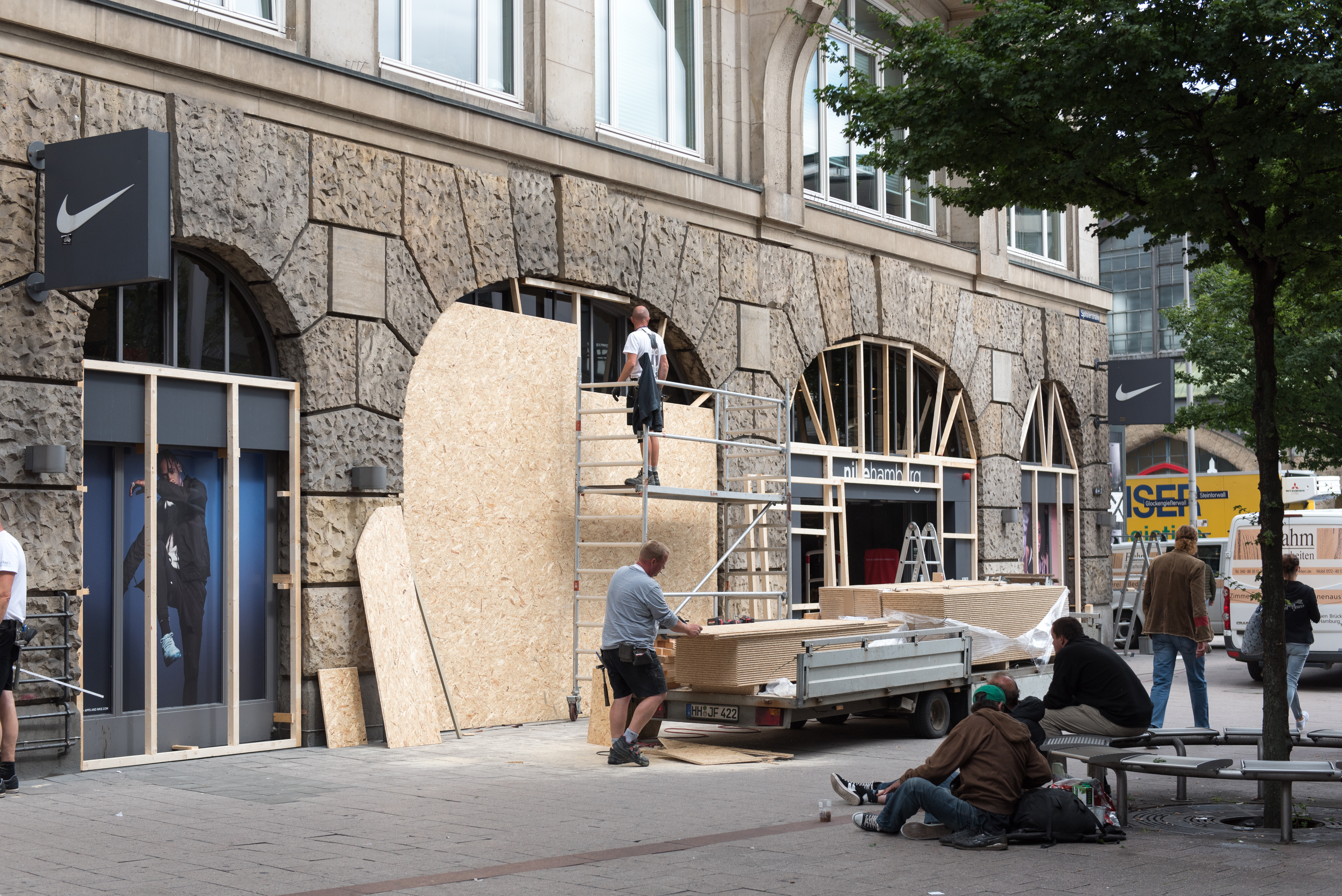 I